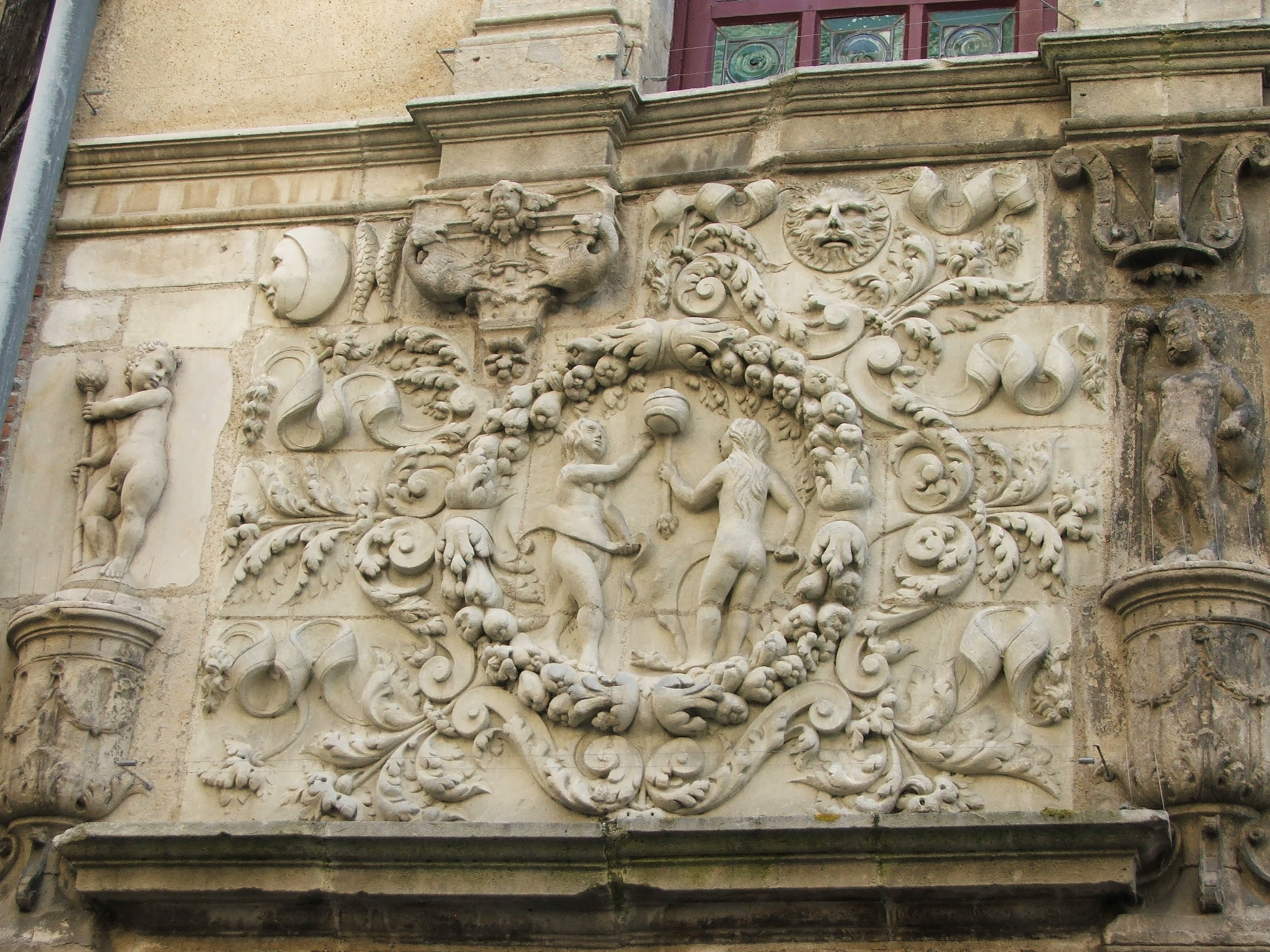 Gravure de la maison d'Adam et Eve dans le Vieux-Mans, hôtel particulier bâti par Jean de Lespine en 1520.